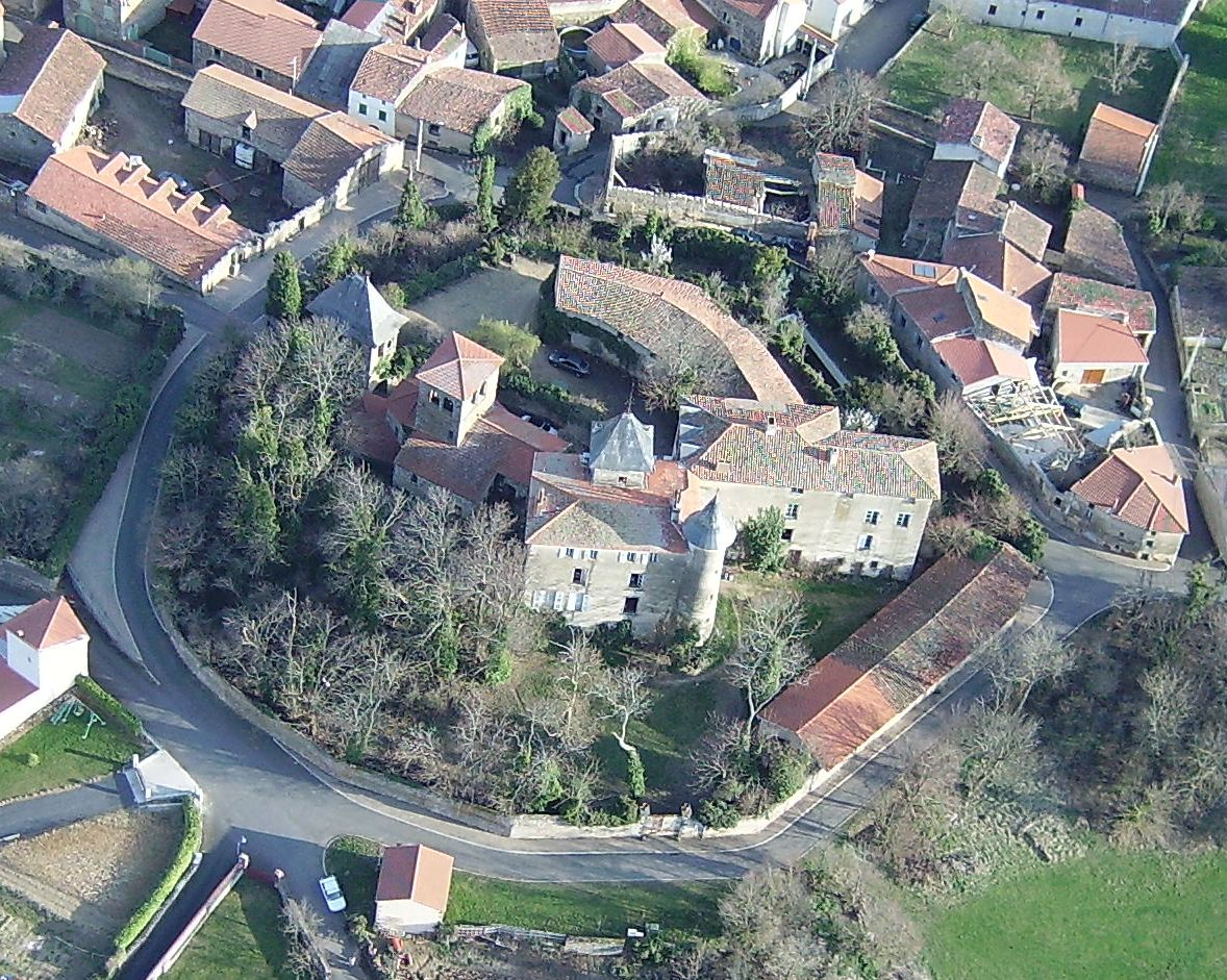 vue aérienne du haut de Moriat